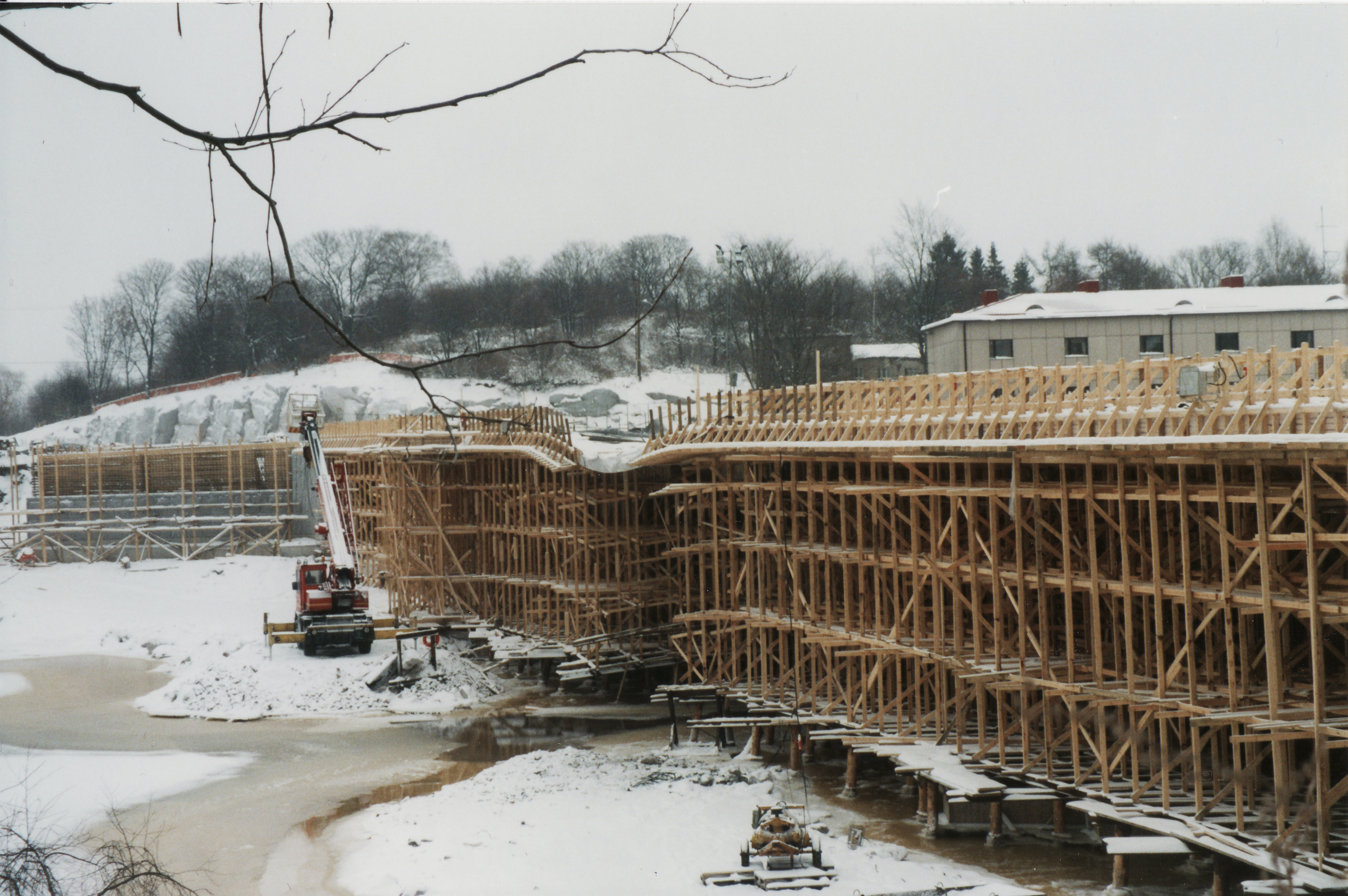 Rakennusvaiheessa ollut Turun Tuomaansilta notkahti tammikuussa 1999.